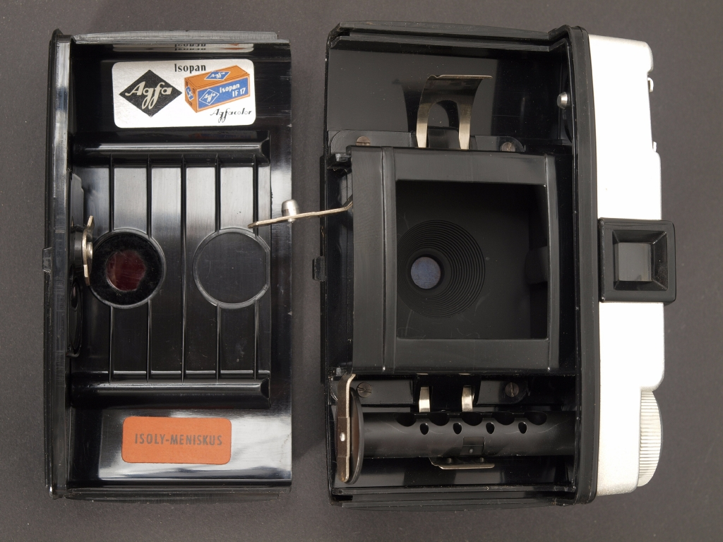 Agfa Isoly Typ 1100. Einfacher Fotoapparat für Rollfime (120) im Format 4x4 cm mit 16 Aufnahmen. Meniskusobjektiv, eine Belichtungszeit 1/30 sec und 2 Blenden 16 und 11, keine Entfernungseinstellung, jedoch „Nahaufnahmen“ 2,5m -5m über eine einschwenkbare Linse, Filmtransport und Spannen des Verschlusses mit Auslösung getrennt. Um Doppelbelichtungen zu vermeiden Kontrollfenster neben dem Filmtransportrad. Zubehörschuh mit Mittenkontakt!